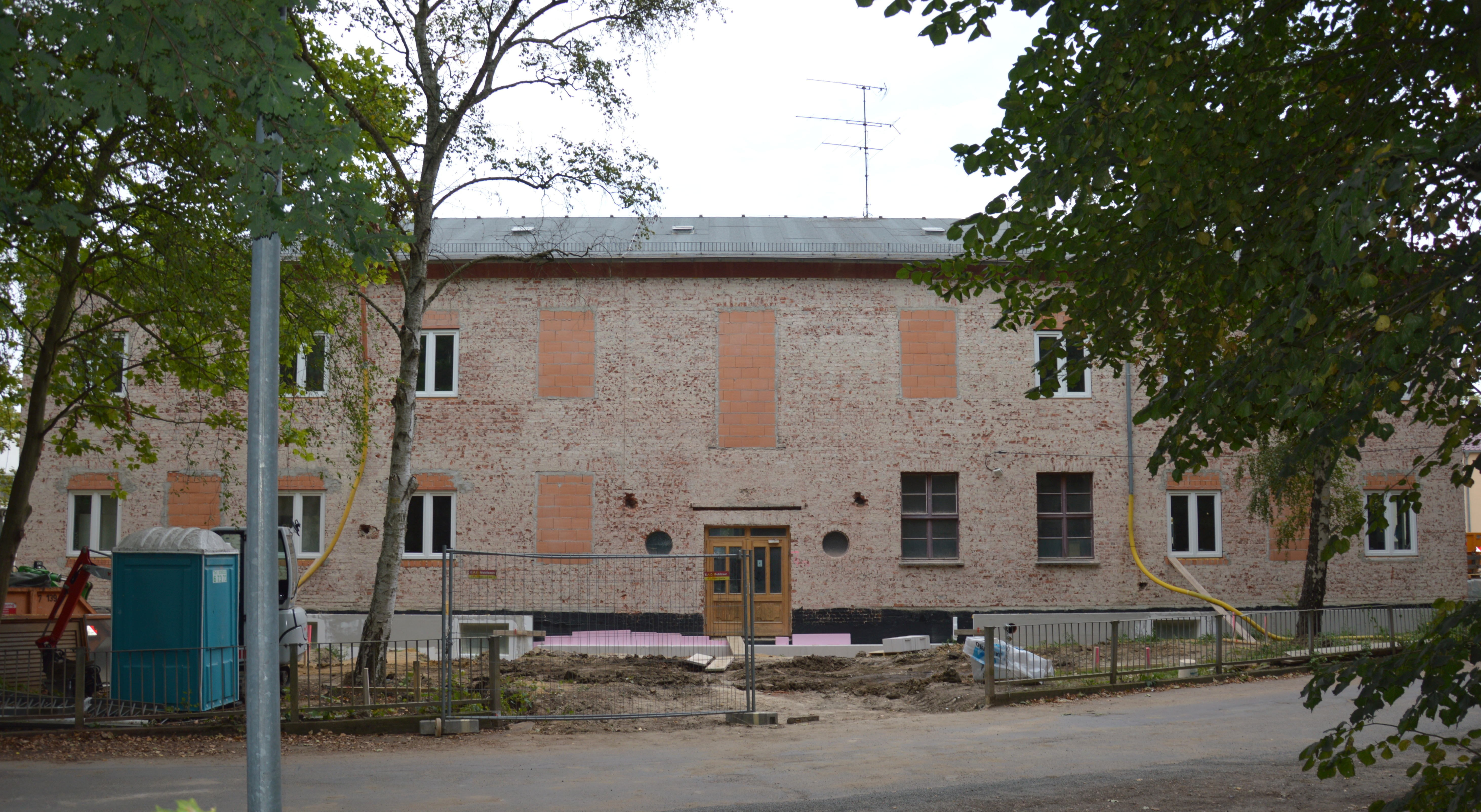 Haus Zur Muttereiche 2 in Magdeburg